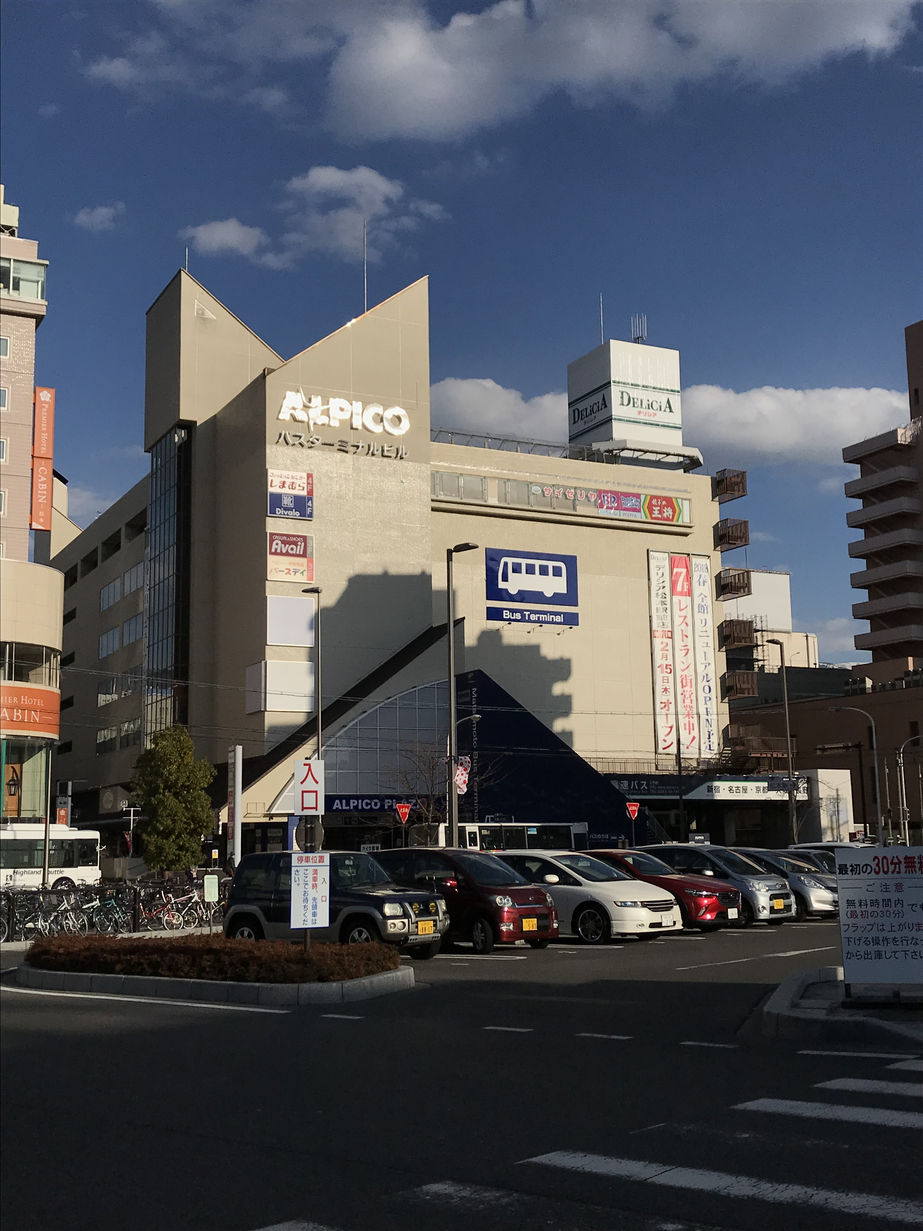 アルピコプラザ 1stSTAGE ver.